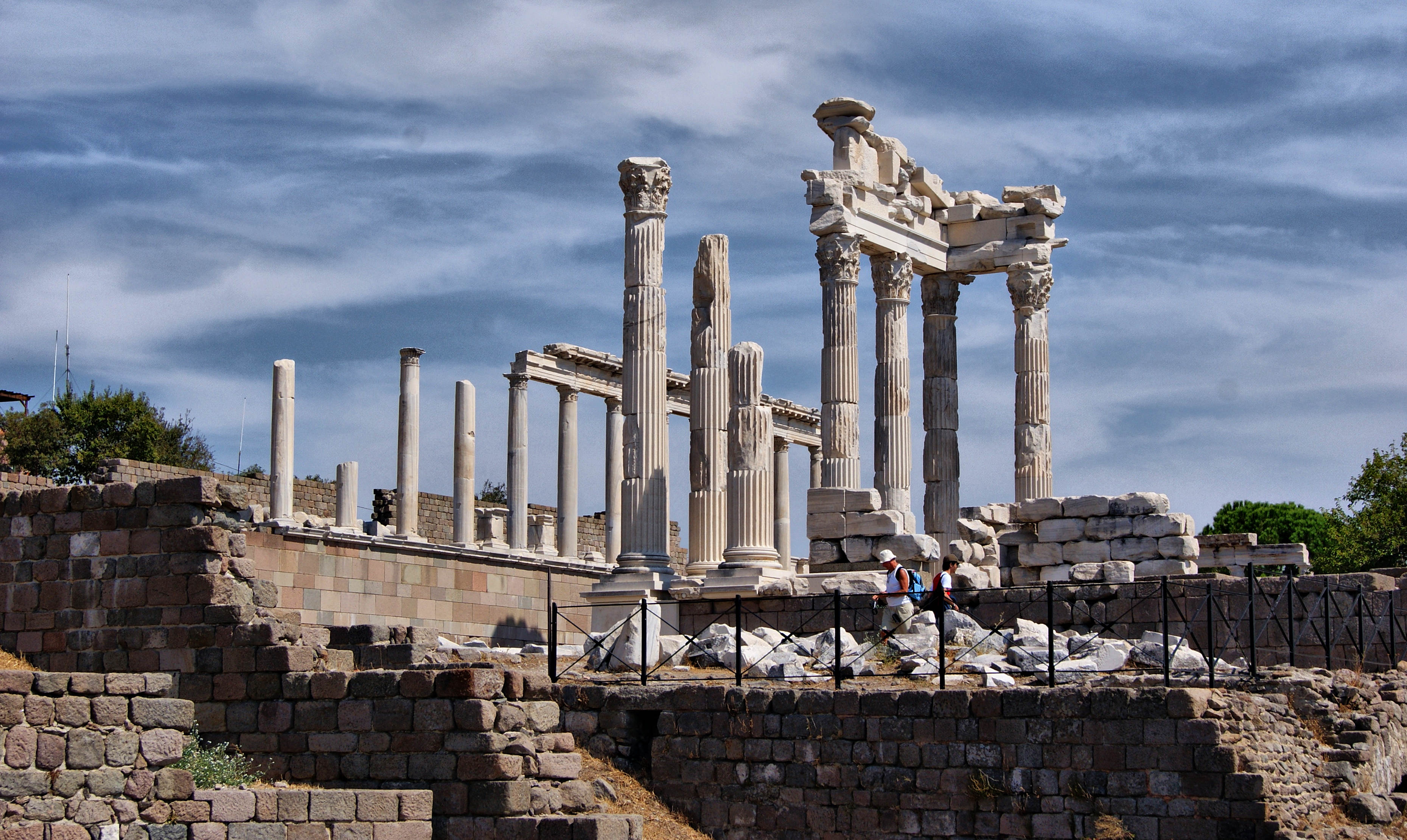 Bergama - AKRAPOL